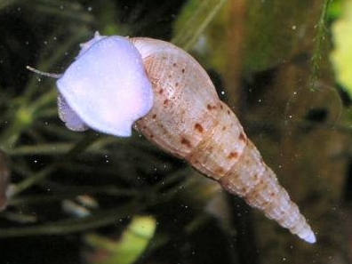 Melanoides tuberculatus